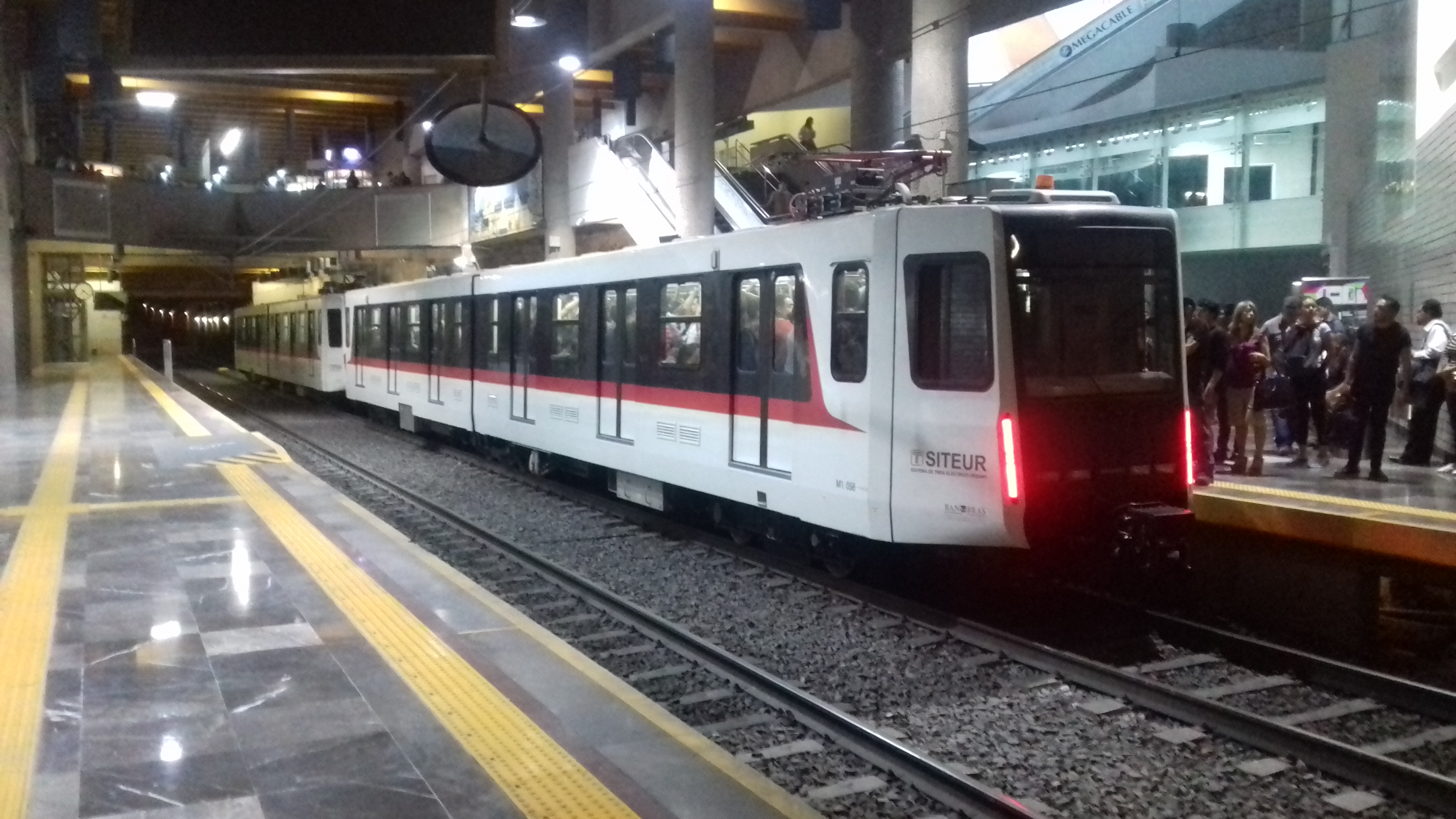 Un TEG-15 llegando a la estacion Juarez de la Linea 2